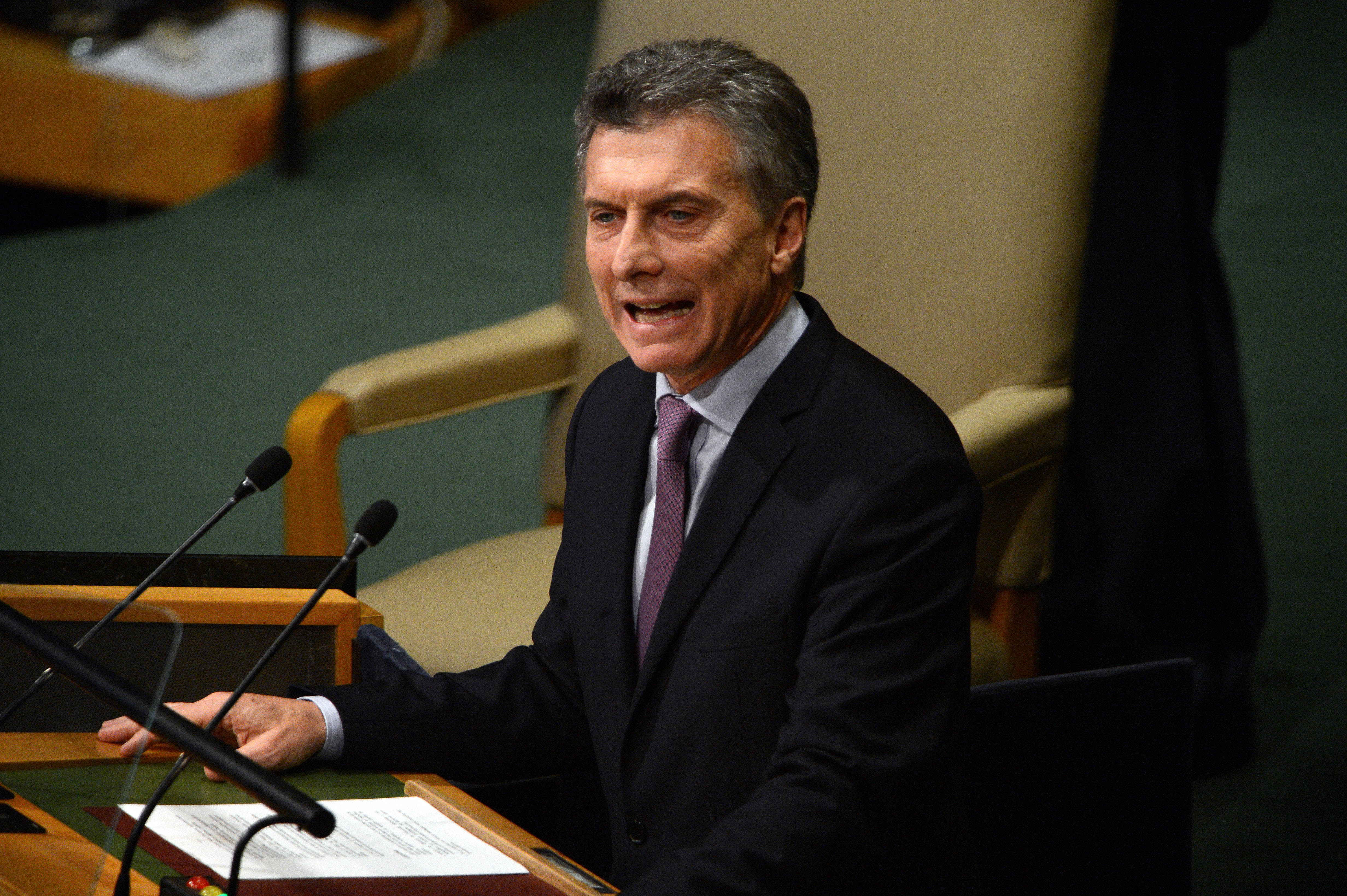 El presidente argentino Mauricio Macri expone ante la 71 Asamblea General de las Naciones Unidas, en Nueva York.